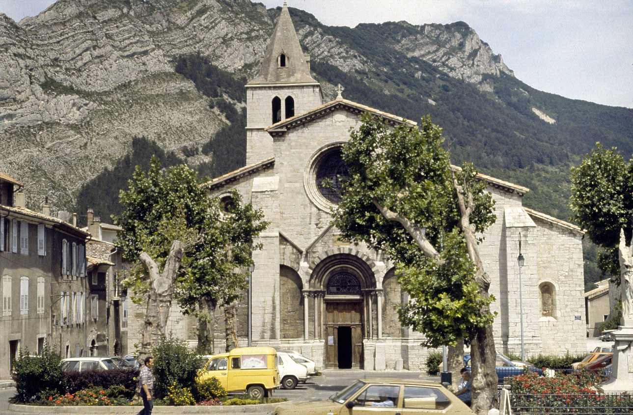 Sisteron, Dép. Alpes-de-Haute-Provence, France: cathedral